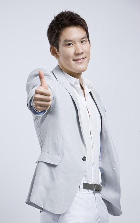 LG Whisen 박태환 광고사진